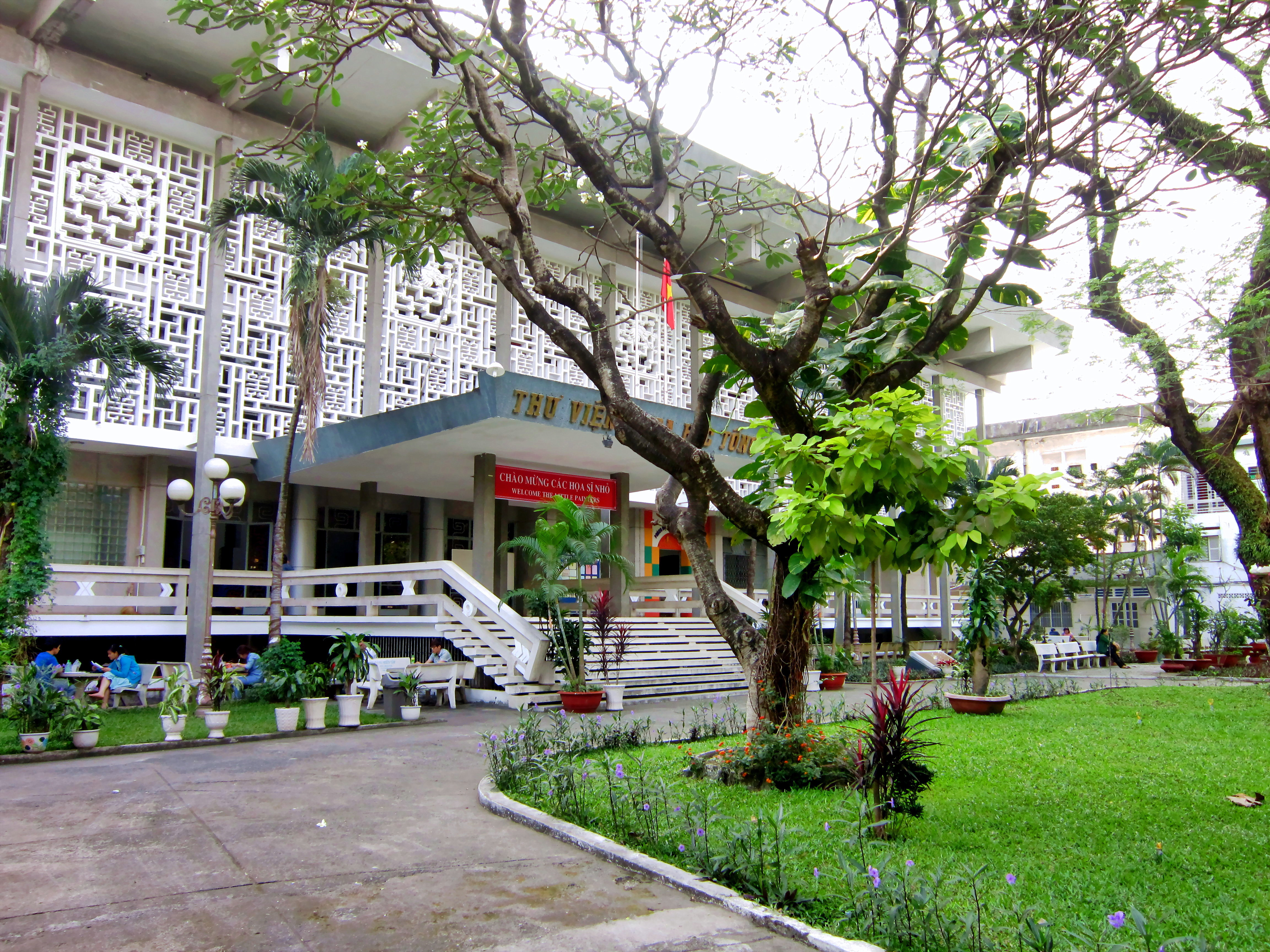 Thư viện Khoa học Tổng hợp thành phố Hồ Chí Minh ở số 69, đường Lý Tự Trọng, phường Bến Thành, quận 1, Thành phố Hồ Chí Minh, Việt Nam. Ở thời Pháp thuộc, nơi đây đã từng tồn tại Khám Lớn Sài Gòn (Maison Centrale de Saigon) .